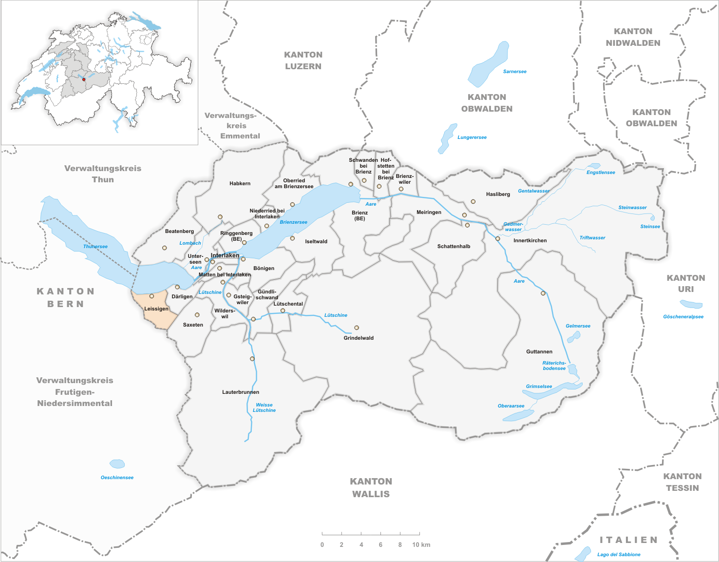 Municipality Leissigen